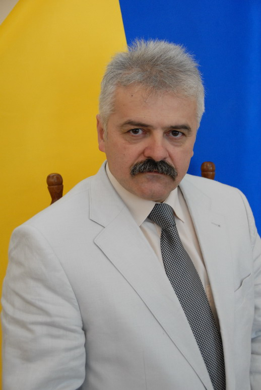 Андрусишин Богдан Іванович — академік АН вищої школи України